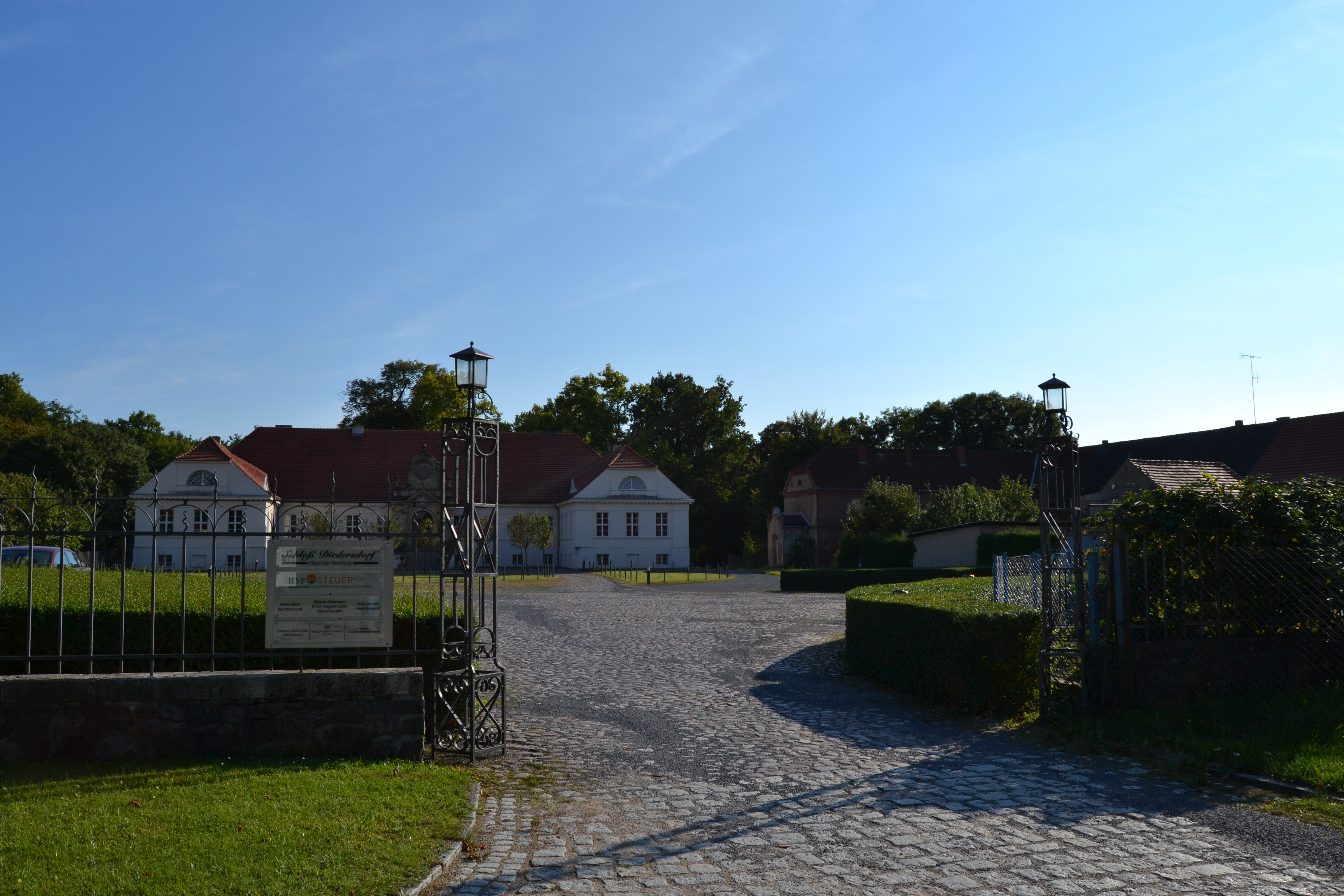 Gutshaus und Gutspark Diedersdorf; Schloß Diedersdorf 51